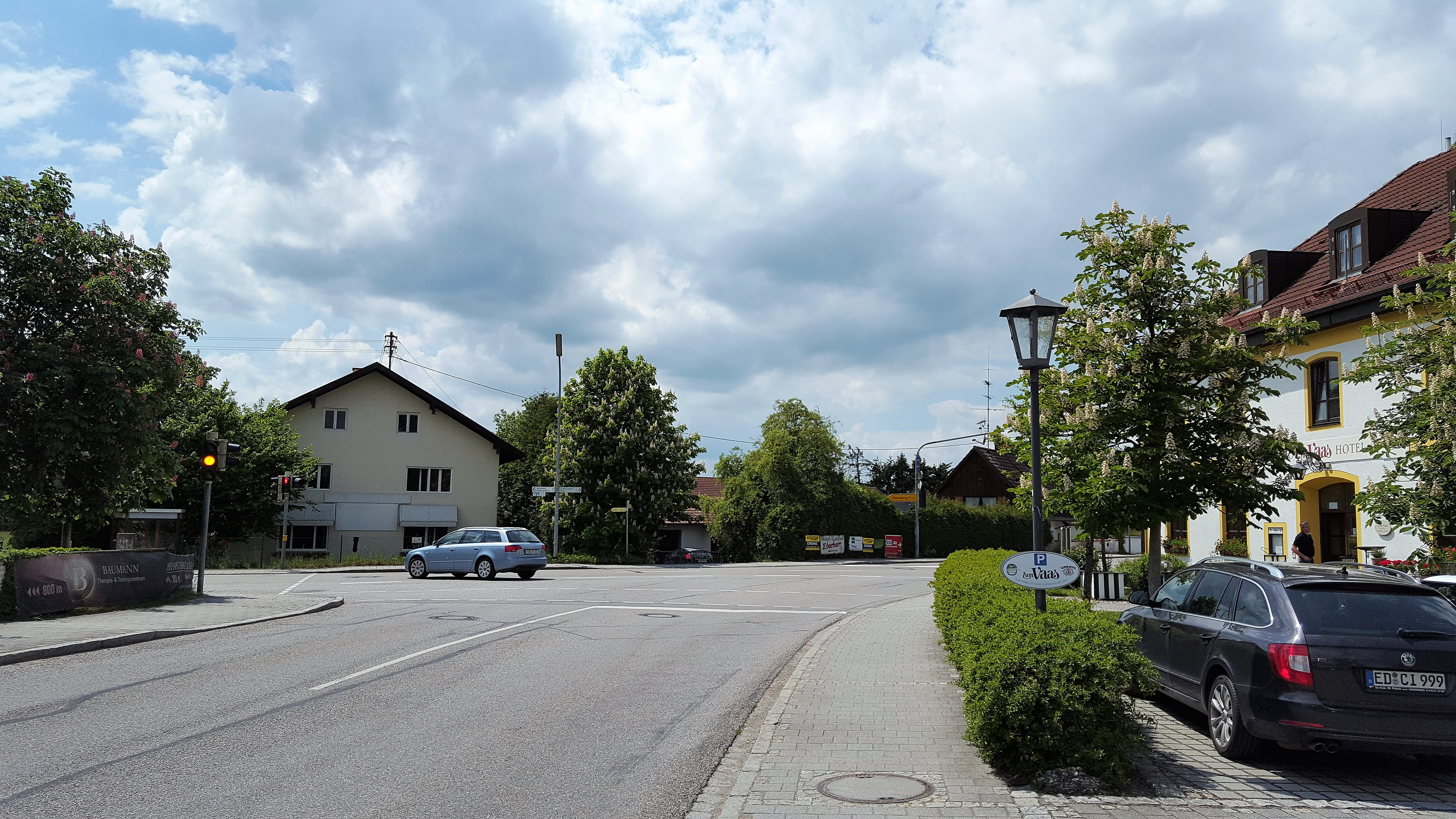 Kreuzung von Schwaberwegen, Forstinning